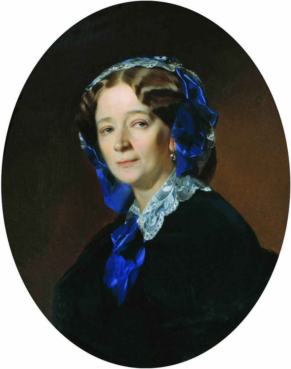 Юлия Николаевна Зиновьева, ур.Батюшкова (1808-1869), фрейлина, сестра поэта К.Н.Батюшкова. Была замужем с 1829 года за генерал-адъютантом Н.В.Зиновьевым (1801-1882).